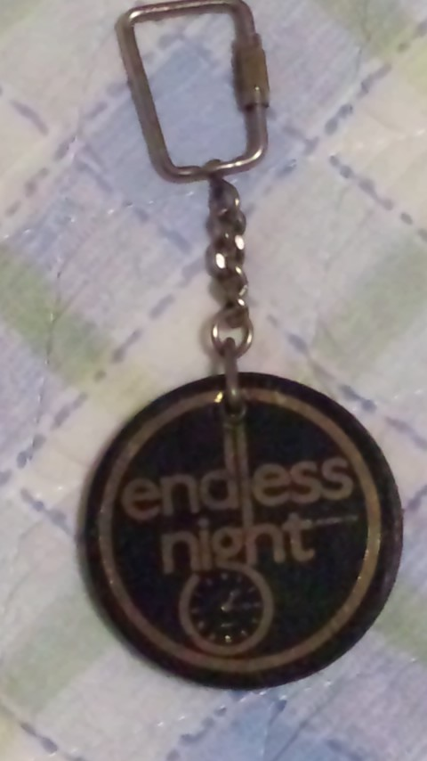 運ホルダー後面